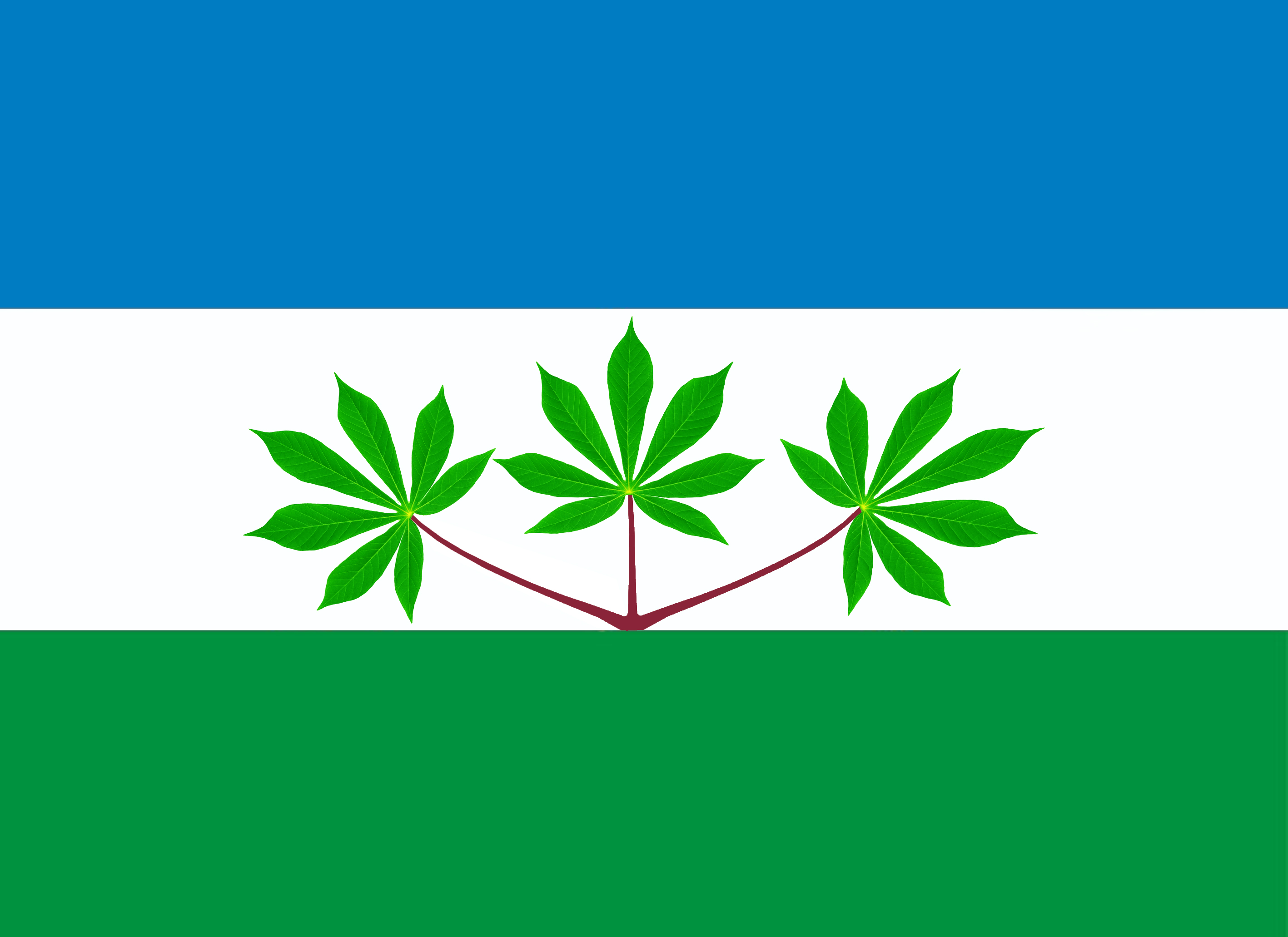 Bandeira do município de Itanagra